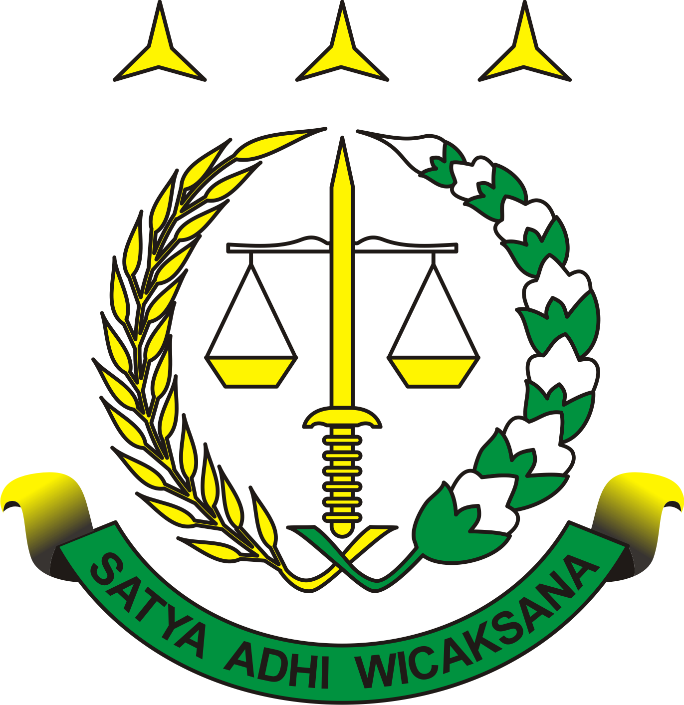 Logo of Kejaksaan Agung